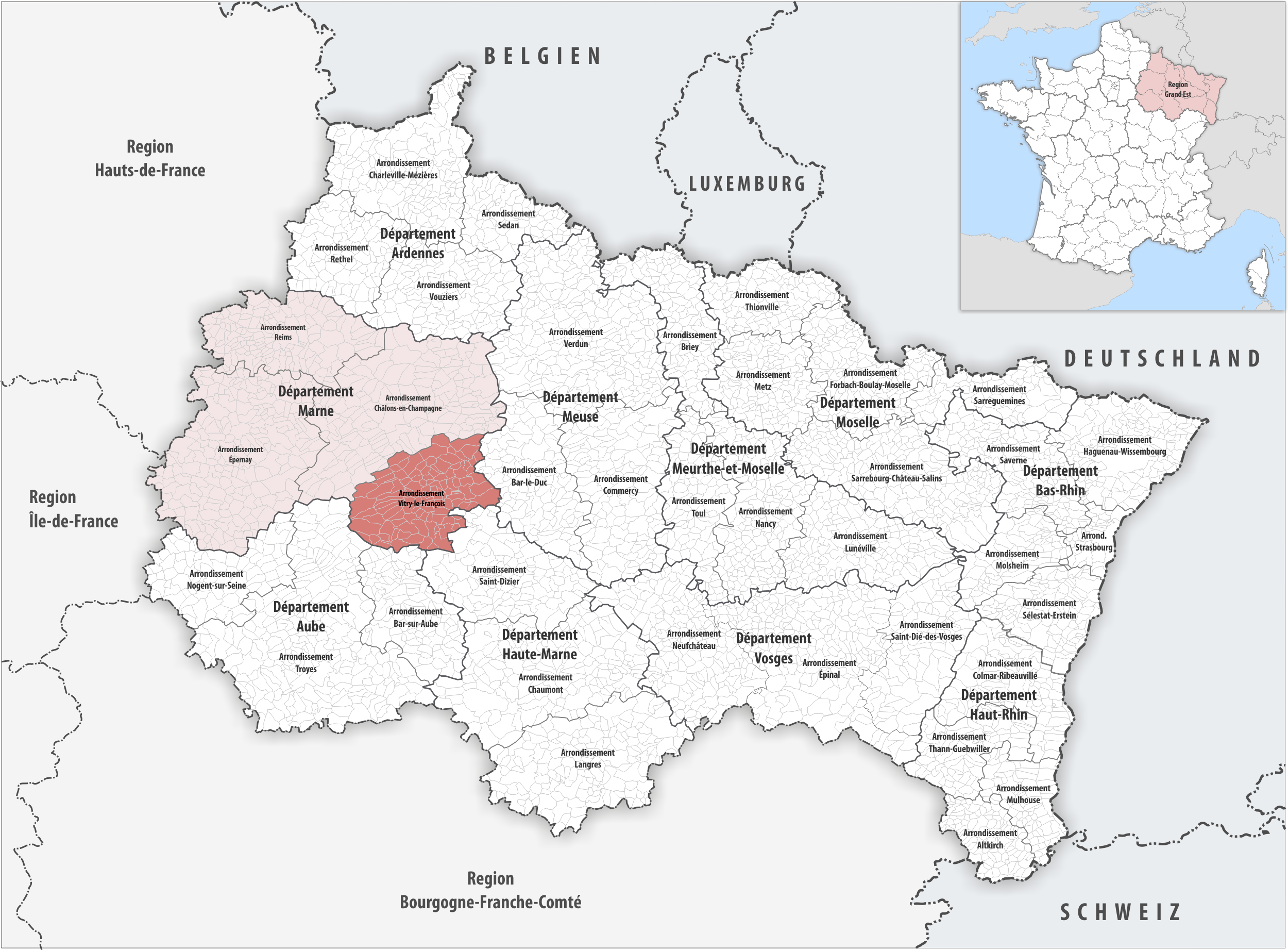 Lage des Arrondissements Vitry-le-François